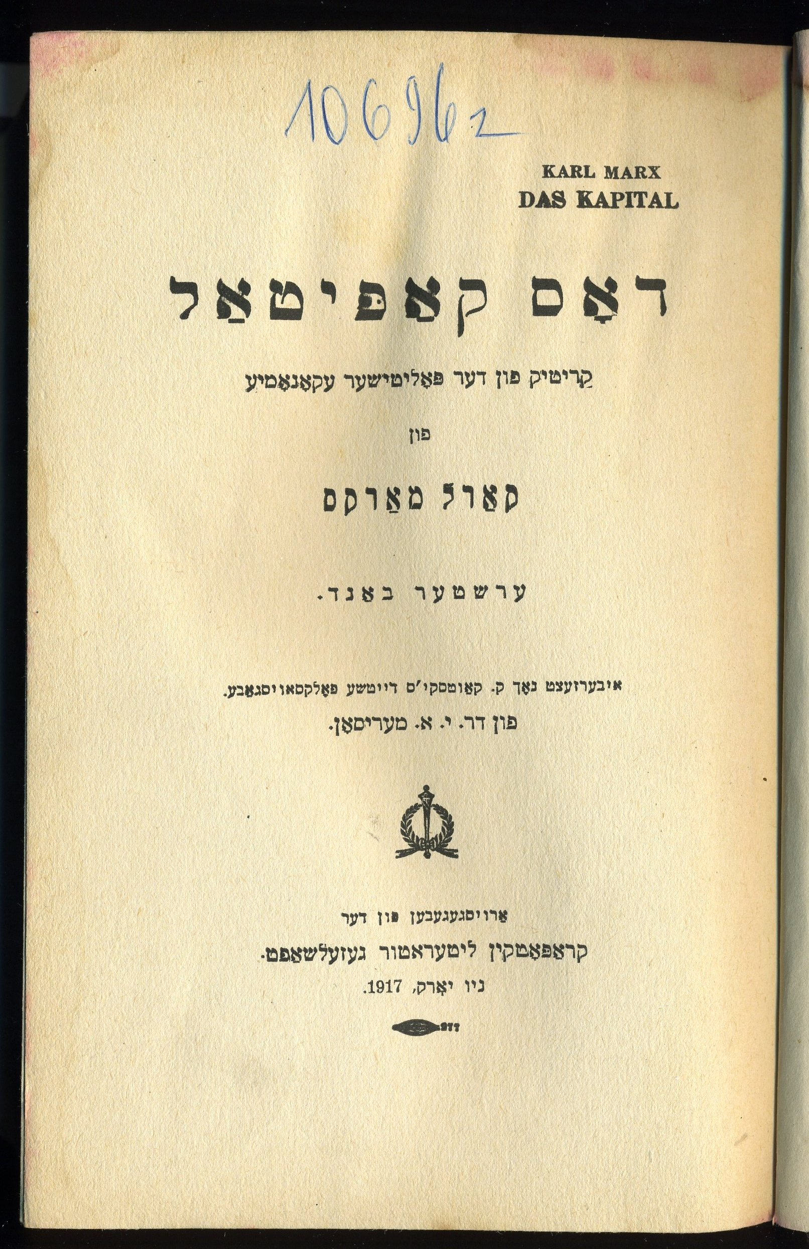 ייִדיש: דאָס קאַפּיטאַל